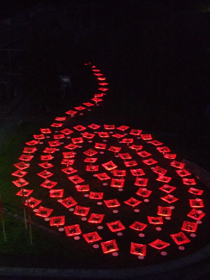 Kunstwerk am Edersee